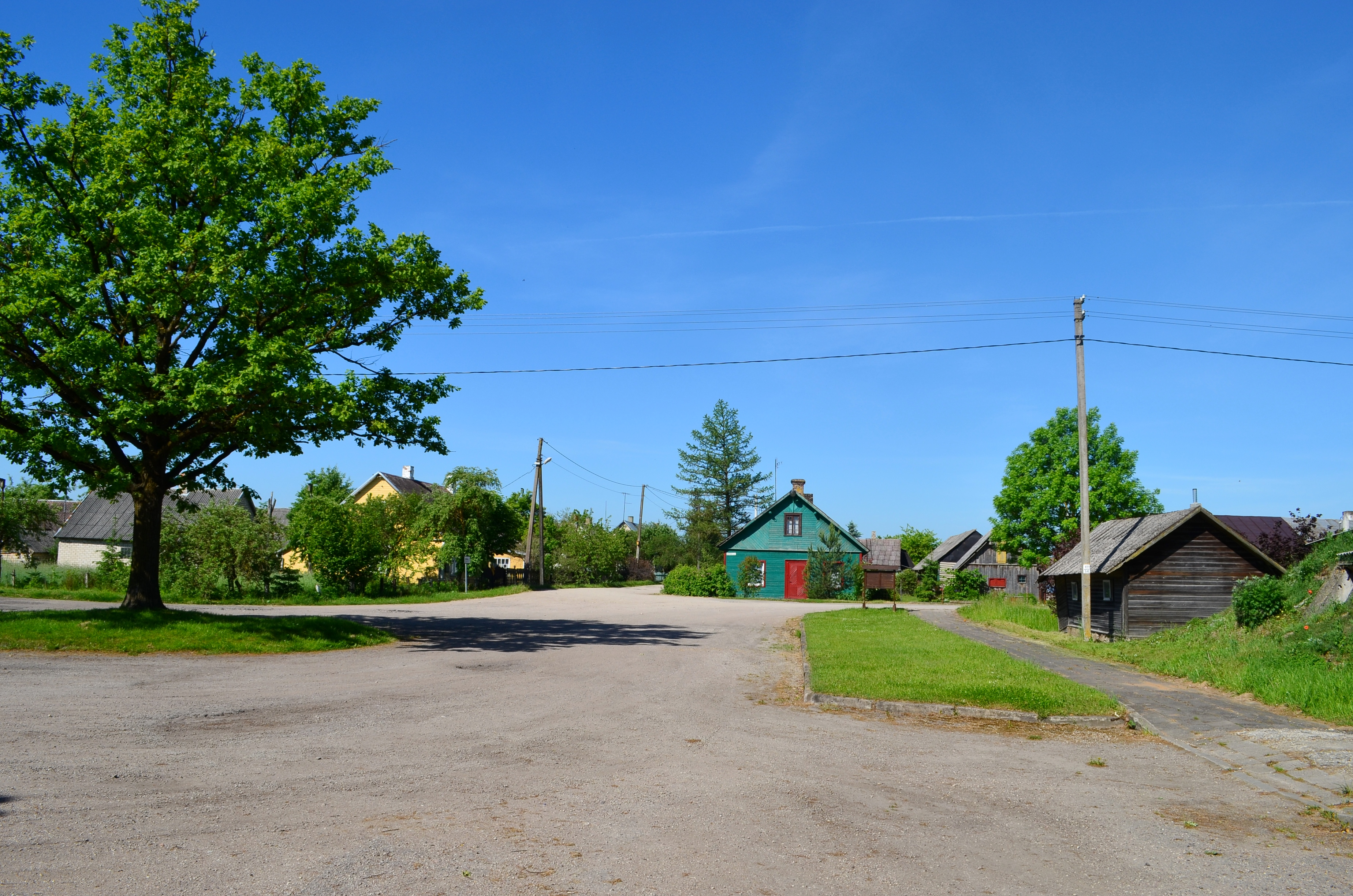 Stoties gatvė, Baisogala, Radviliškio raj.